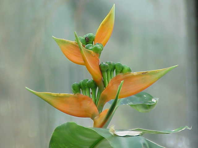 Species: Heliconia aurantiaca Family: Heliconiaceae Image No. 3